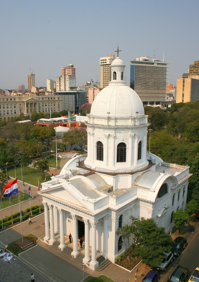 Vista diurna del Panteón Nacional desde el Palacio Alegre